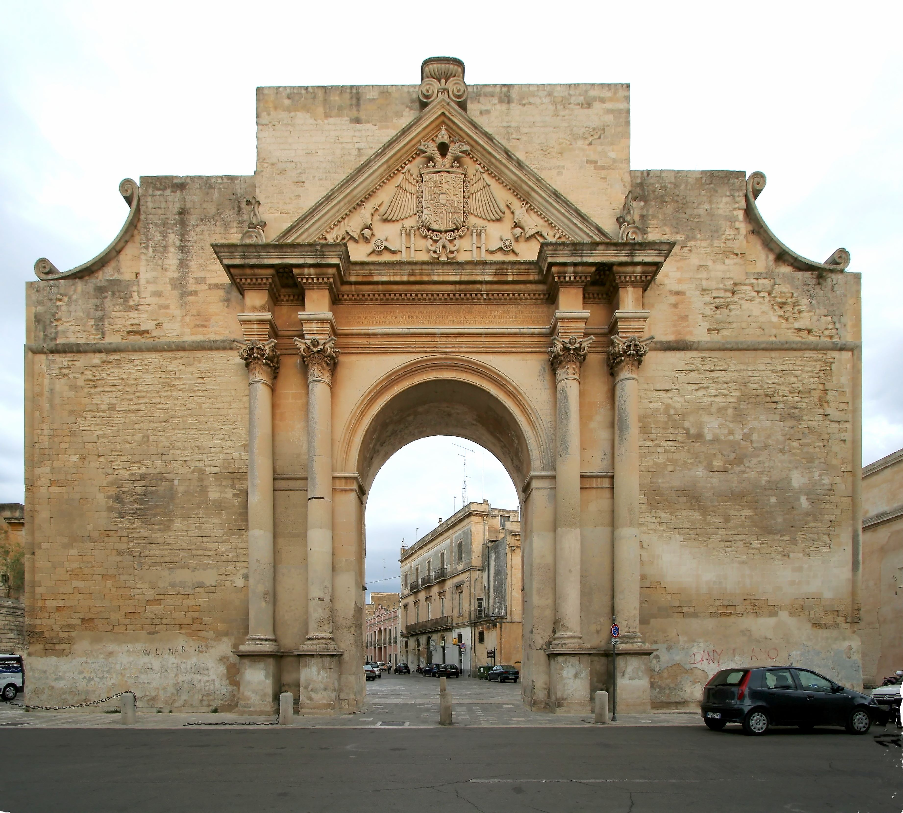 Porta Napoli in Lecce, architect: Gian Giacomo dell'Acaya